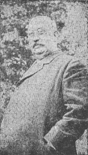 Jesús Fernández Suárez